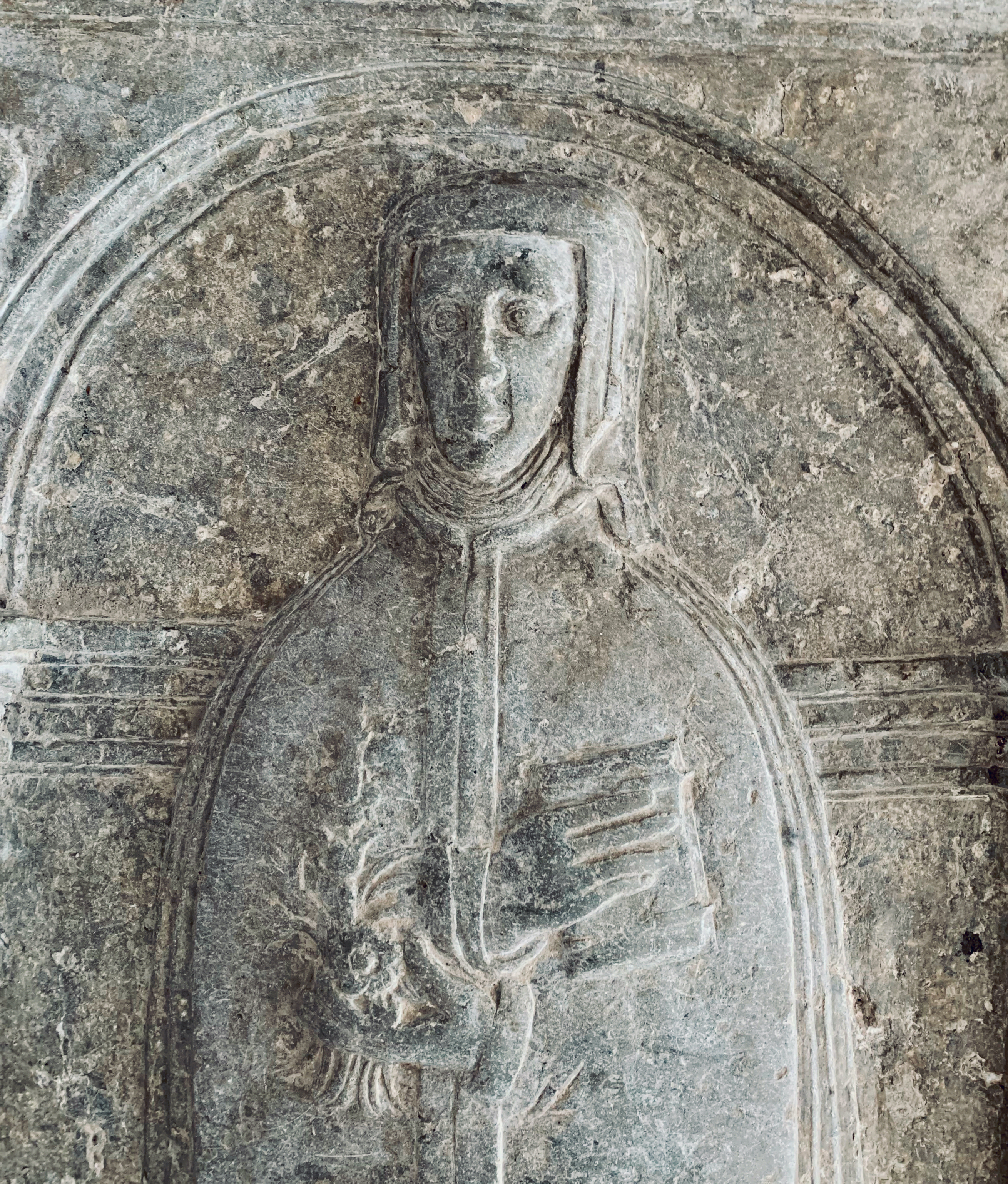 Udsnit af Margrete Urnes lligsten i Maribo